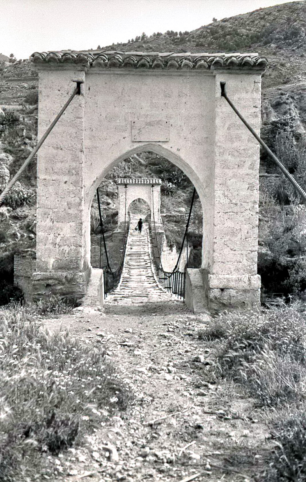 Puente Colgante de Puebla de Arenoso (Castelló)